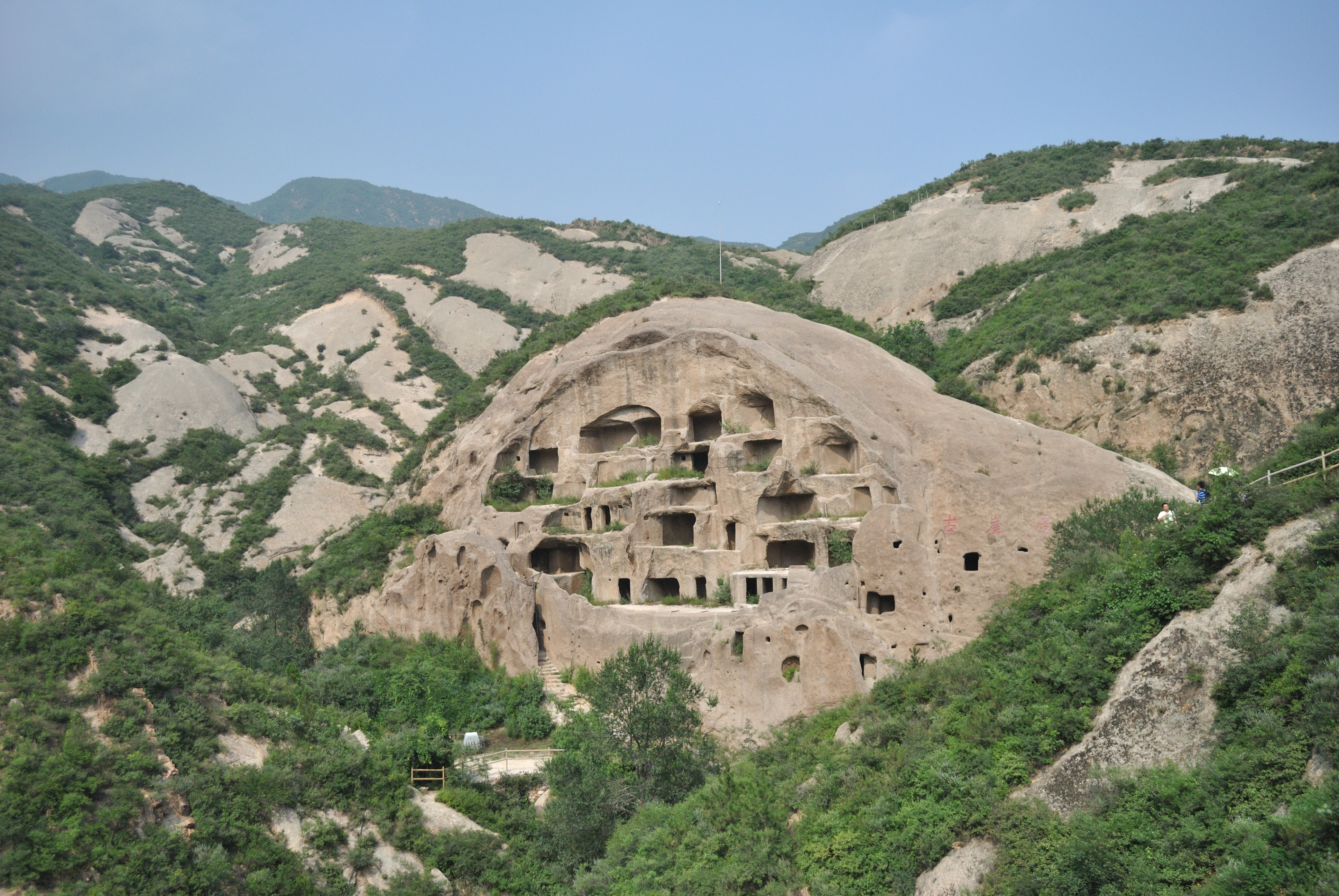 延庆古崖居